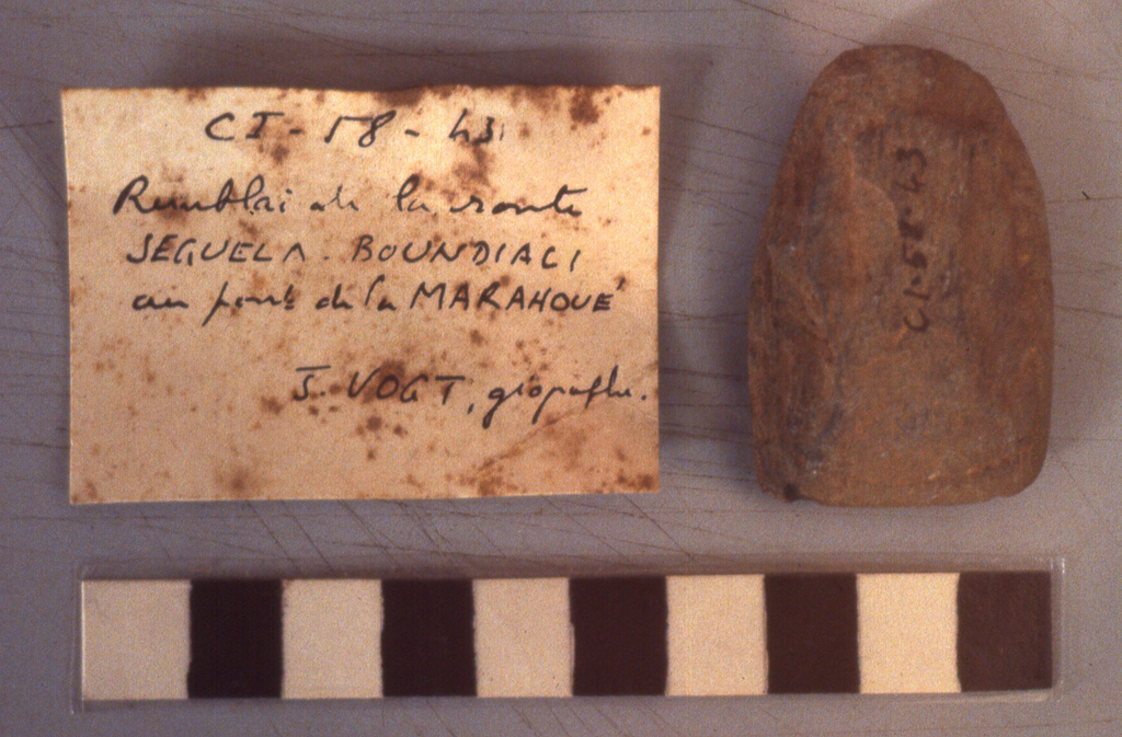 Prehistoric polished stone celt from Côte d'Ivoire (west Africa)/Pierre polie de l'ère préhistorique trouvée au pont de la Marahoué près de Boundiali en Côte d'Ivoire (Afrique de l'ouest). Echelle en centimètres. Photo prise le 16 janvier 1982, au Musée de l'IFAN à Dakar, au Sénégal.